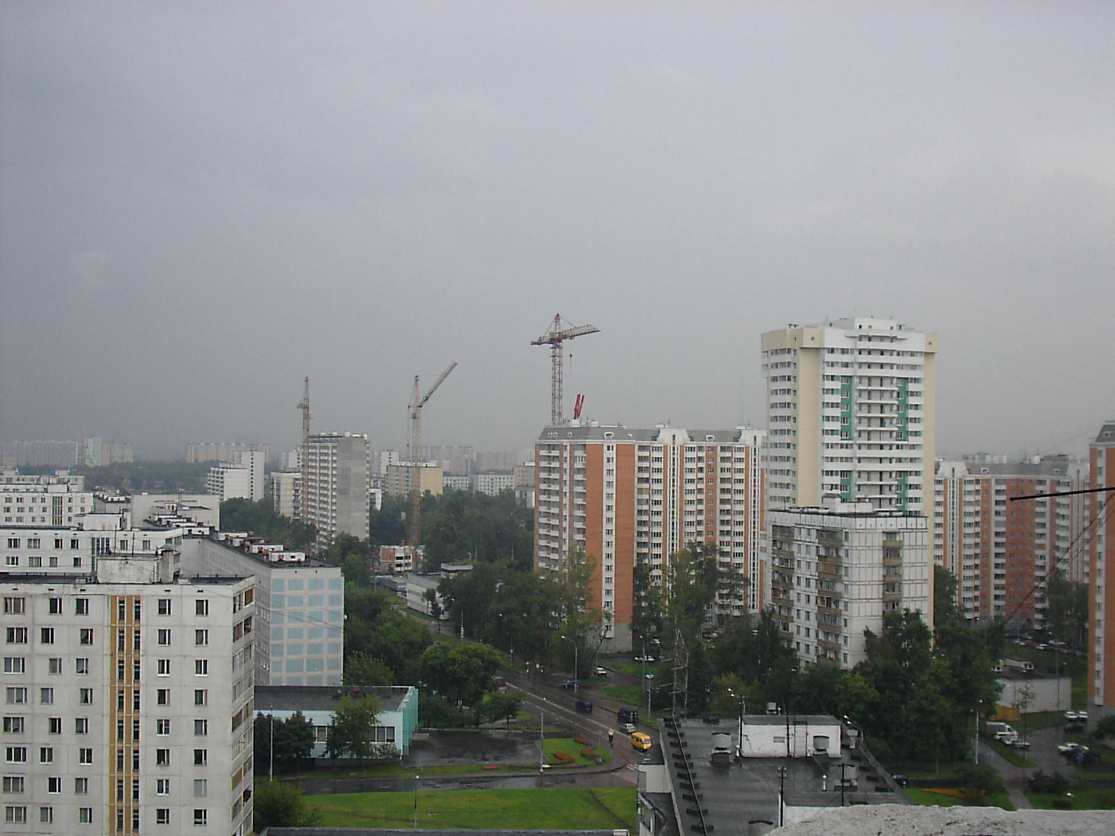 Москва, вид на перекрёсток проезда Шокальского и улицы Молодцова.